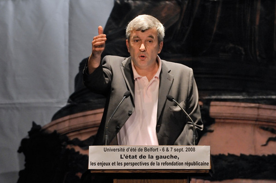 Jean-Luc Laurent à la tribune lors de l'Université d'été de Belfort en septembre 2008